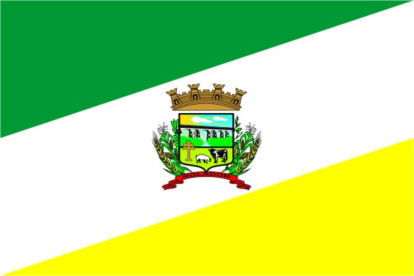 Bandeira do município gaúcho de Rolador, Brasil.